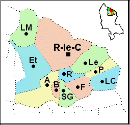 carte du canton de Rougemont-le-Château (Territoire de Belfort)